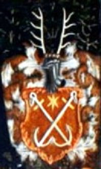 Wappen der (von) Mithoff (Grafik vereinzelt und die Richtung der Heraldik gemäß)